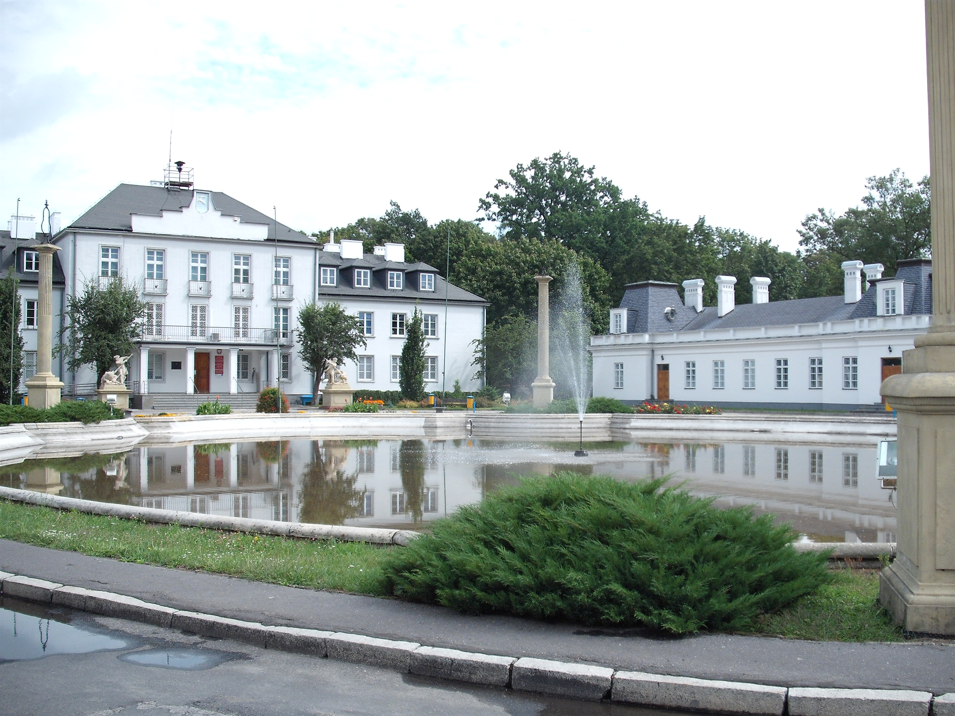 zespół pałacowy, XVIII-XIX-XX: pałac, nr rej.: 200 z 20.08.1955 (nie istnieje ?) park, nr rej.: 630 z 17.12.1957 Kozienice, Gmina Kozienice